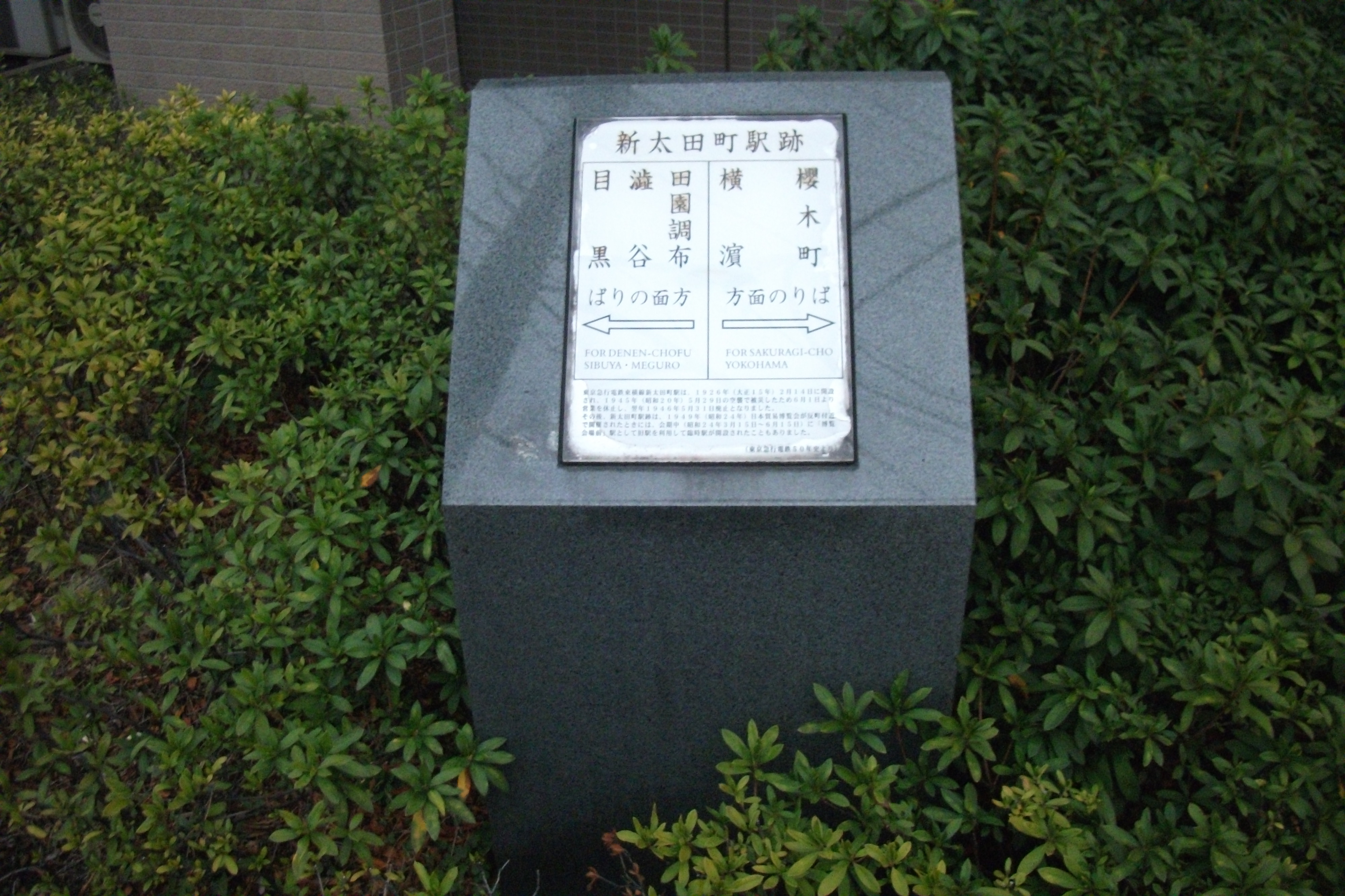 東京急行電鉄東横線新太田駅跡の碑